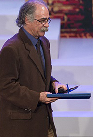 ارشد تهماسبی - پنجمین جشن سالانه موسیقی ما - ۱۵ دی ۱۳۹۷ مرکز همایش های برج میلاد تهران